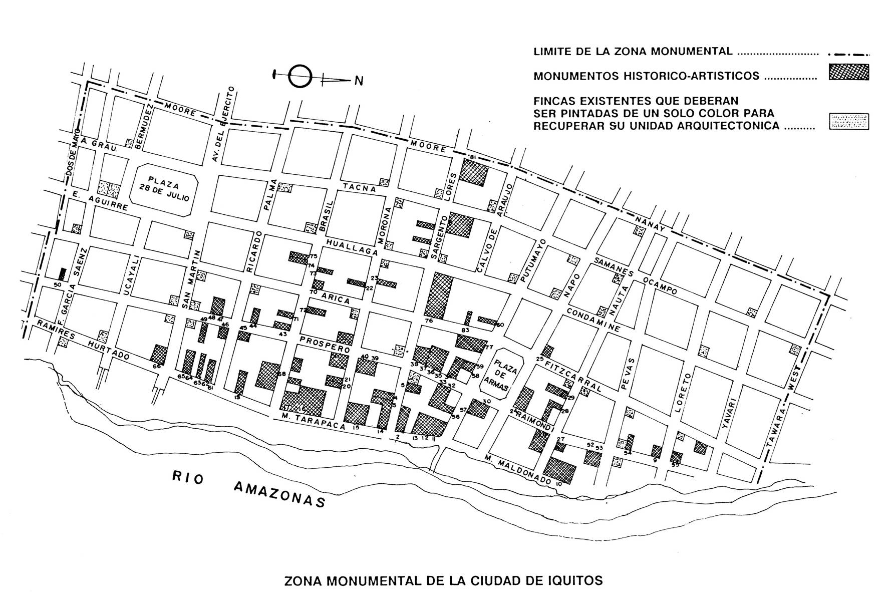 Mapa del centro histórico de Iquitos